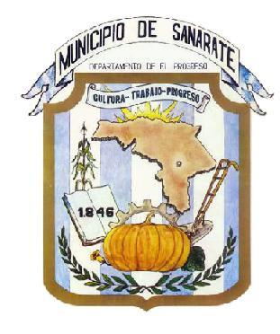 Escudo de Sanarate